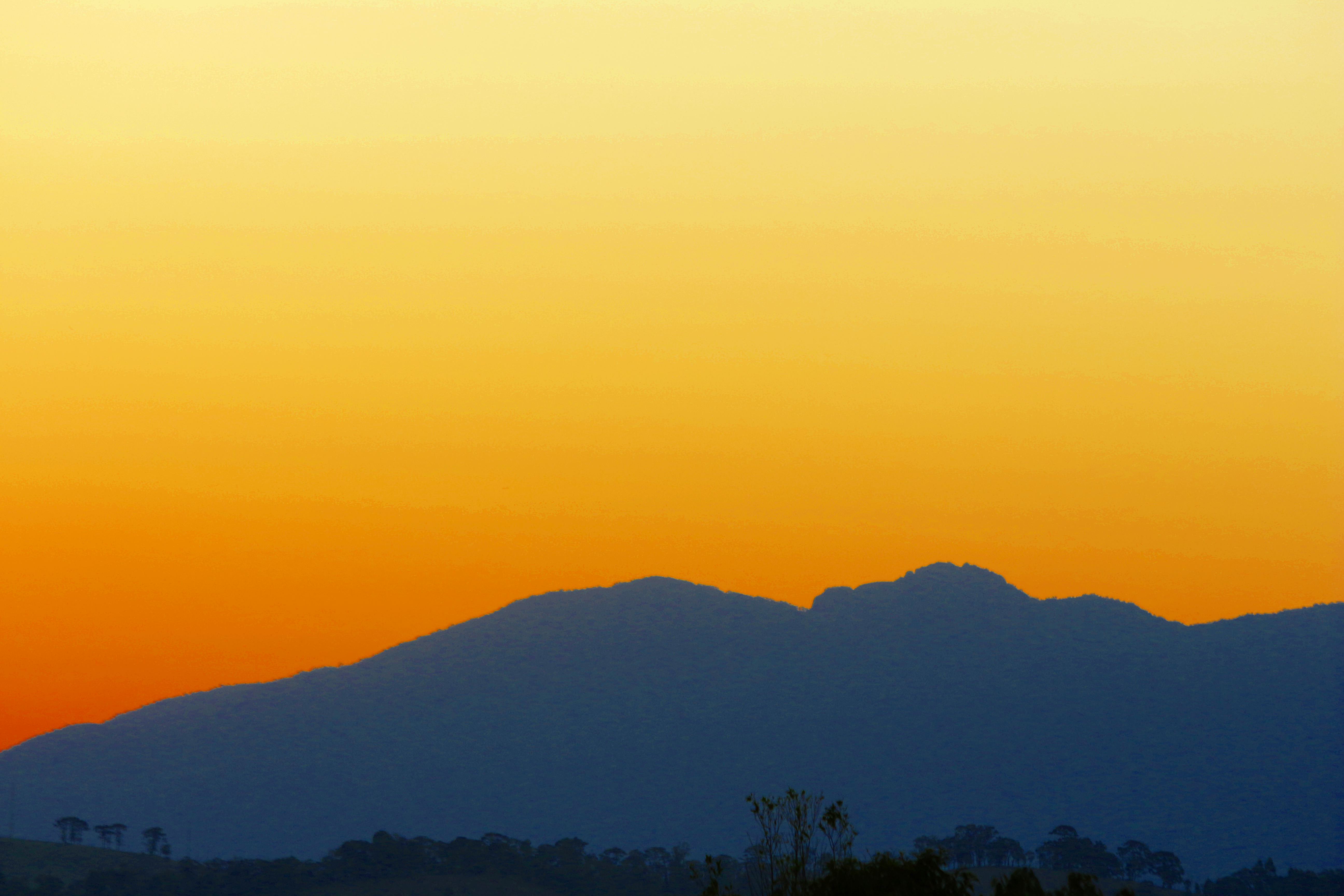 Gigante adormecido, Joanópolis, SP, Brasil. Tirada a aproximadamente 10 km a leste do centro da cidade, no fim do inverno.